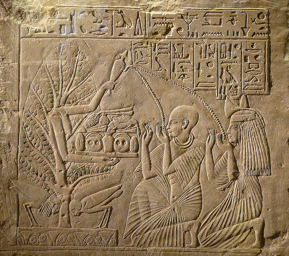 Déesse du sycomore offrant nourriture et boisson à un couple de défunts et à leurs âmes (oiseaux). Relief conservé au Musée de Hanovre.